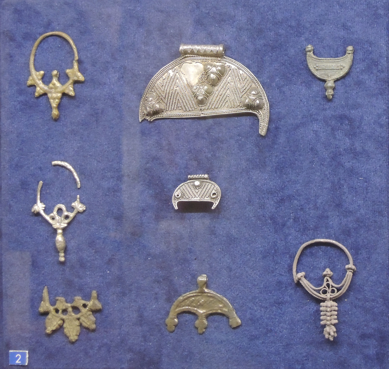 Комплекс украшений славянской женщины. Лунница (подвеска в форме полумесяца). височные кольца, бусы. Серебро, бронза. стекло, медь, сердолик, хрусталь, янтарь; литьё, ковка, зернь, скань. Кат. 200-205. Государственный исторический музей. Археологический музей кафедры археологии МГУ.